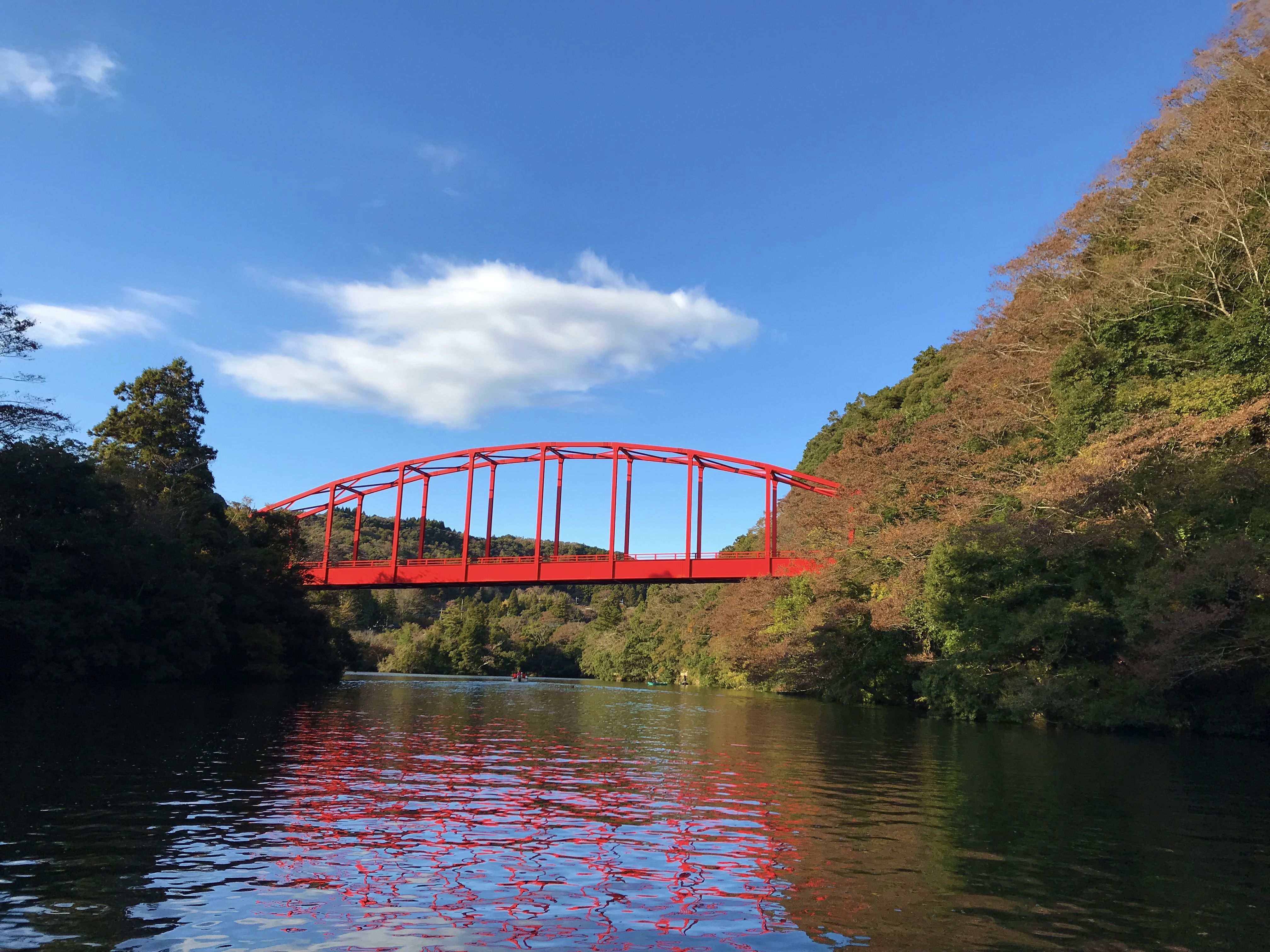 君津市亀山湖の秋風景